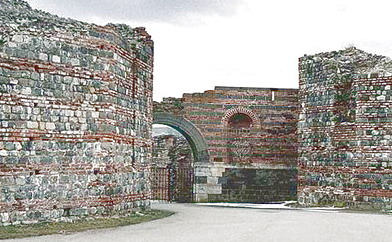 Felix Romuliana est un ensemble architectural serbe datant de l'époque romaine situé à proximité du village de Gamzigrad. Patrimoine mondial de l'humanité (UNESCO)